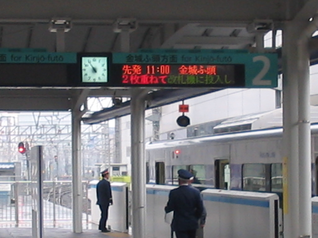 Metrohalte Aonomilijn, Nagoya